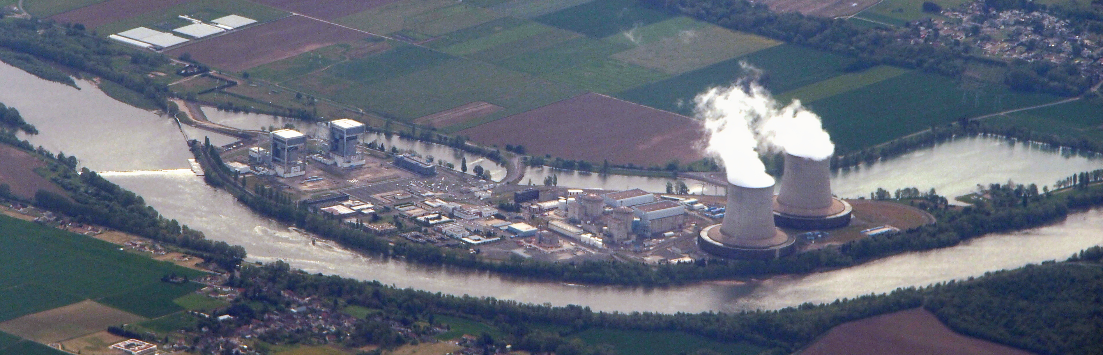 Vue aérienne de la centrale nucléaire de Saint-Laurent-des-eaux 2016